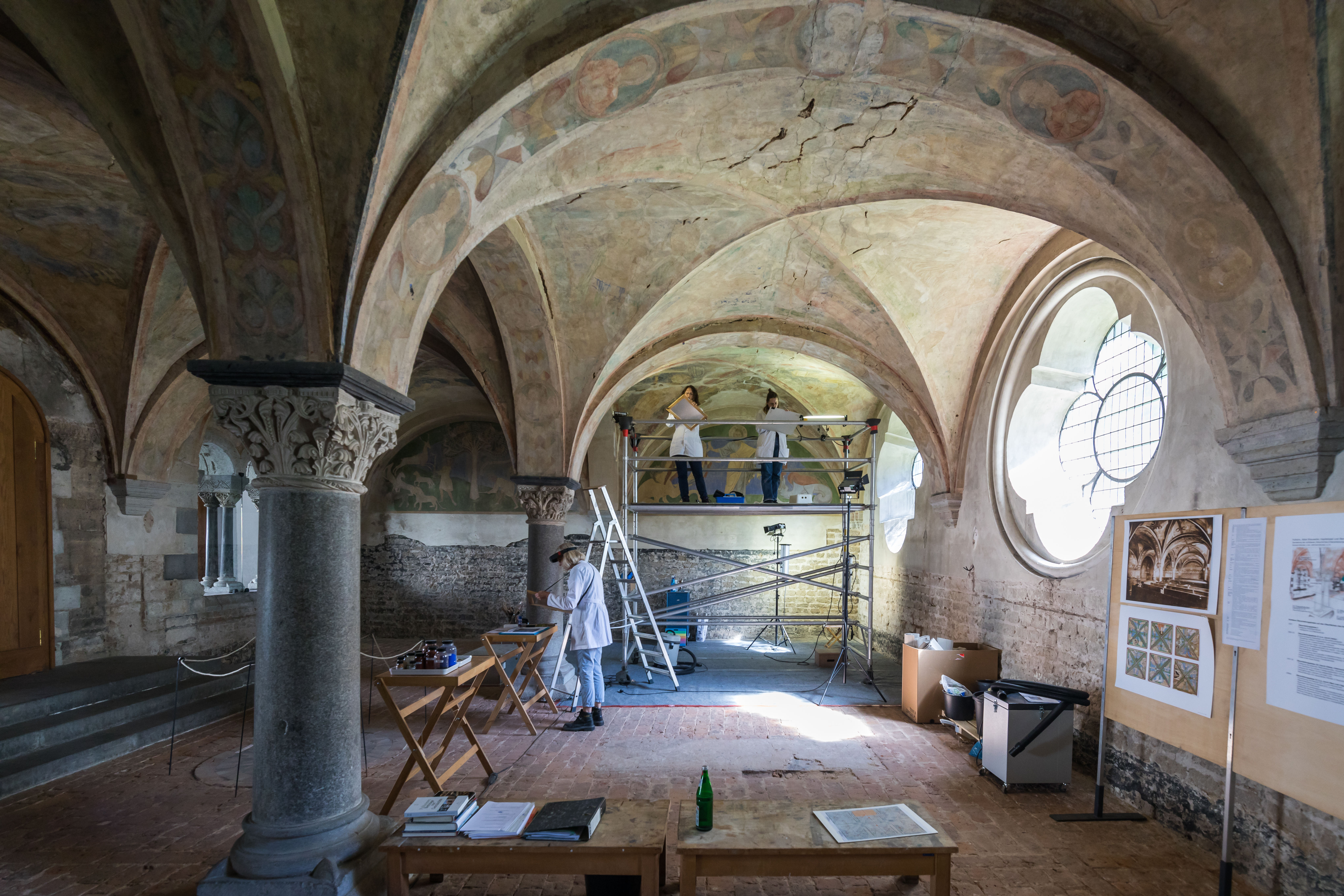 Abtei Brauweiler, Kapitelsaal - Forschungsrestaurierung Gewölbemalereien durch Restauratorinnen und Restauratoren des LVR-Amts für Denkmalpflege im Rheinland